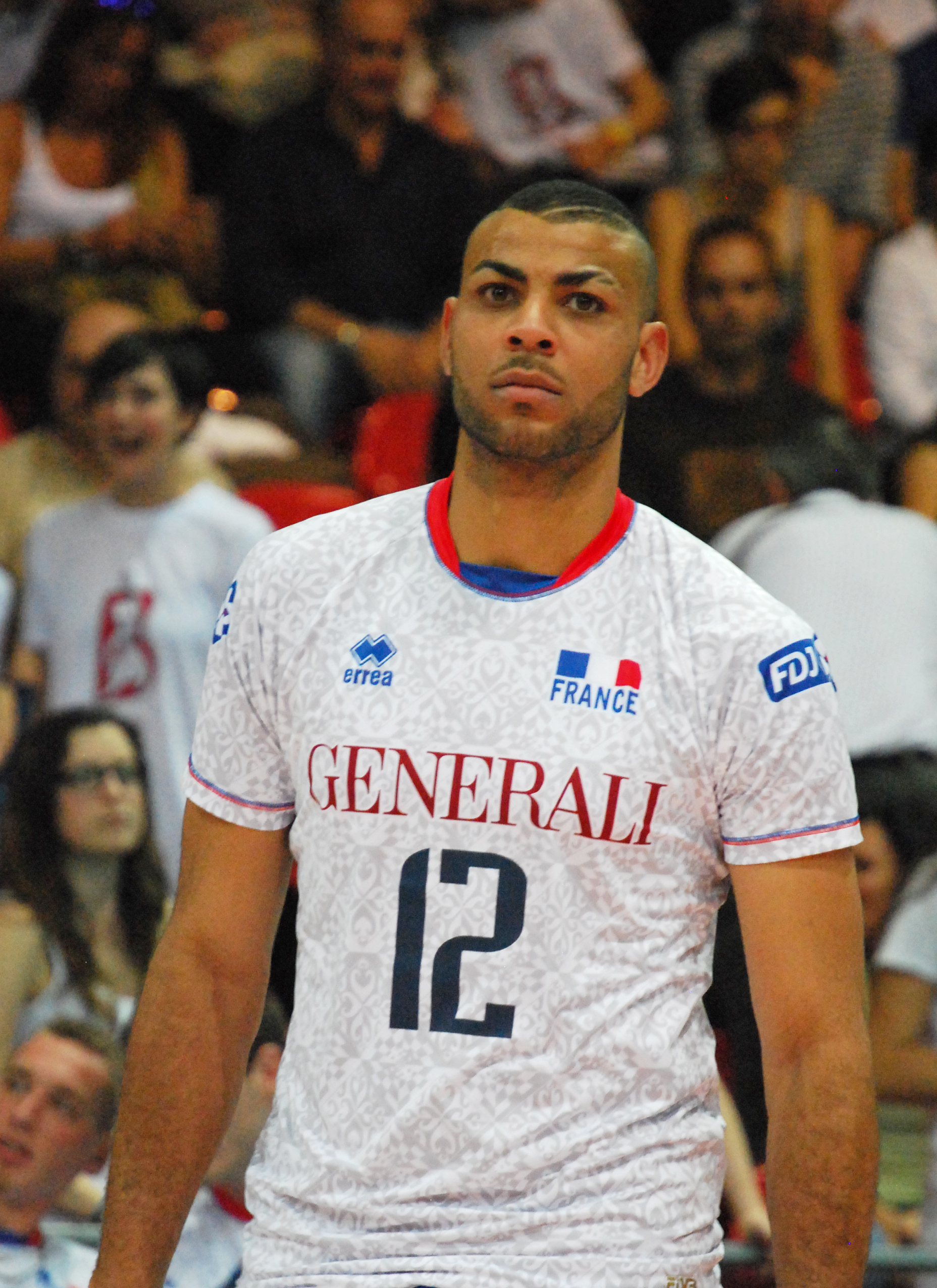 Earvin N'Gapeth